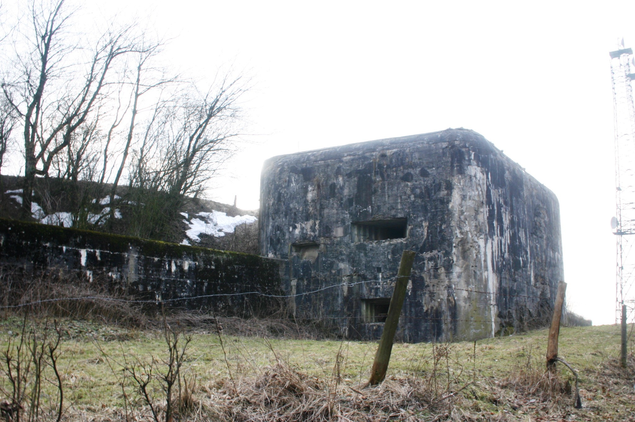 Fort de Battice Block II. Battice